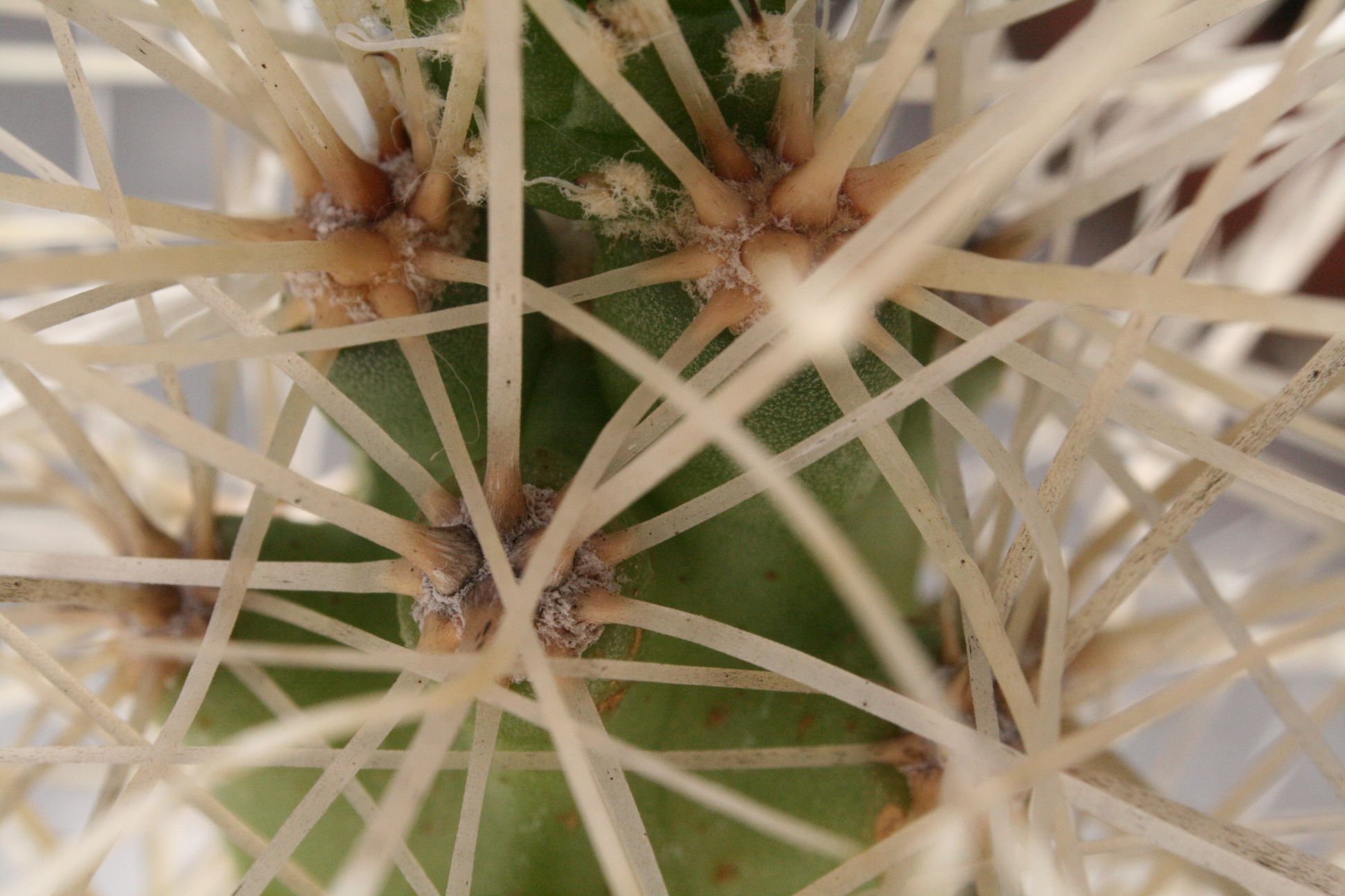 Echinocereus enneacanthus tövisei